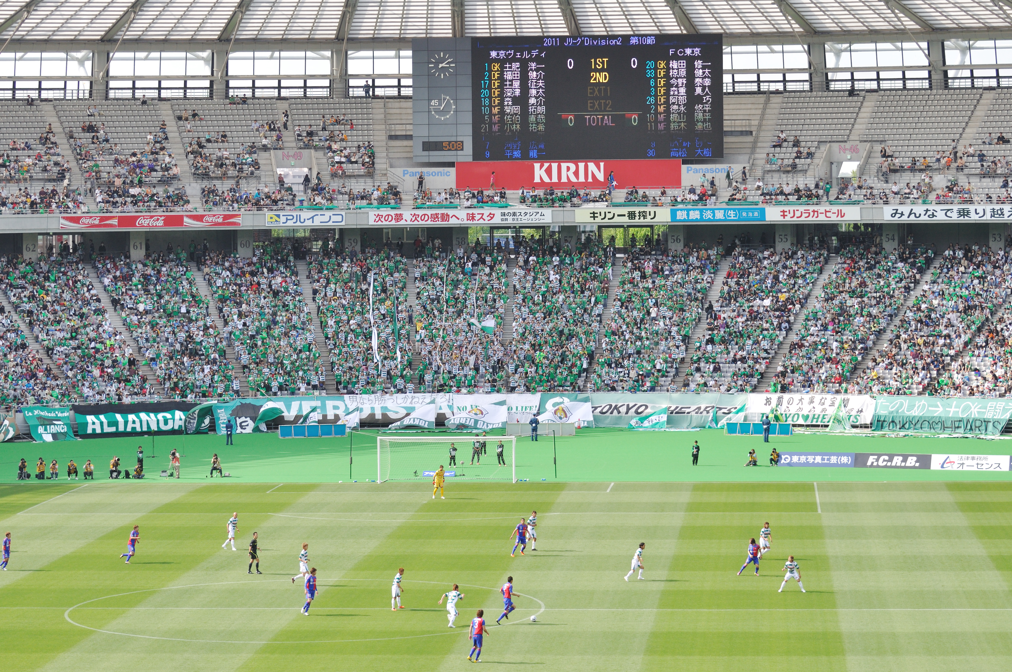 Tokyo derby 2011 - 2